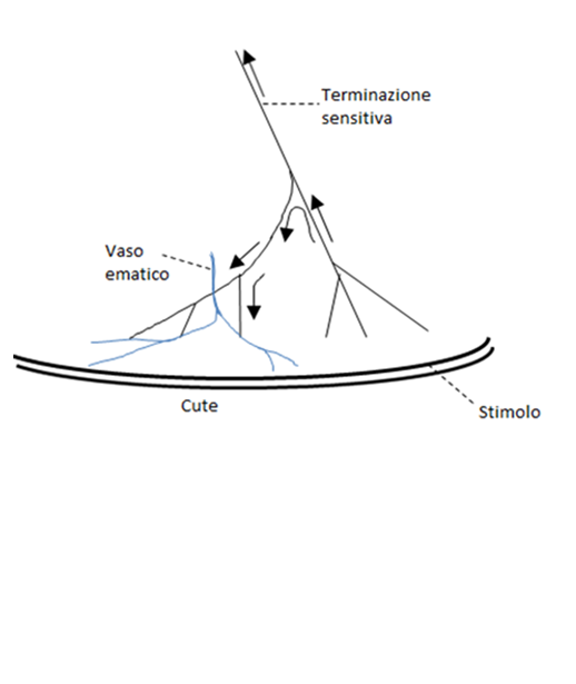 Fibre dolorifiche di tipo C. Conduzione degli impulsi in due direzioni: centralmente (dromicamente) verso il midollo spinale, con l’insorgenza della sensazione dolorosa; perifericamente (antidromicamente), verso i vasi cutanei, tramite le ramificazioni assoniche, con la conseguente dilatazione delle arteriole nella zona stimolata.